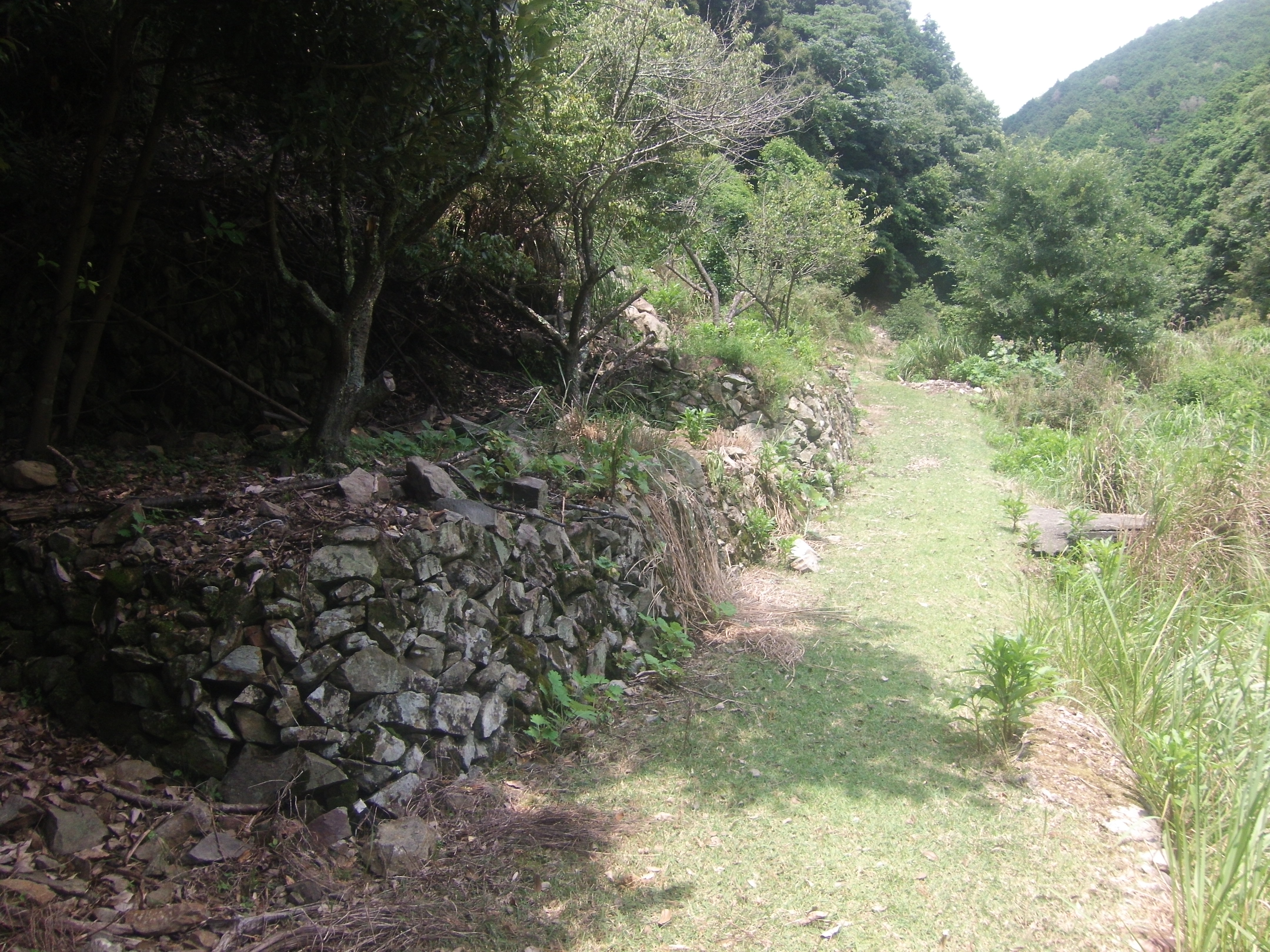 旧集落跡を抜ける熊野古道・紀伊路、路傍に石垣が残されている